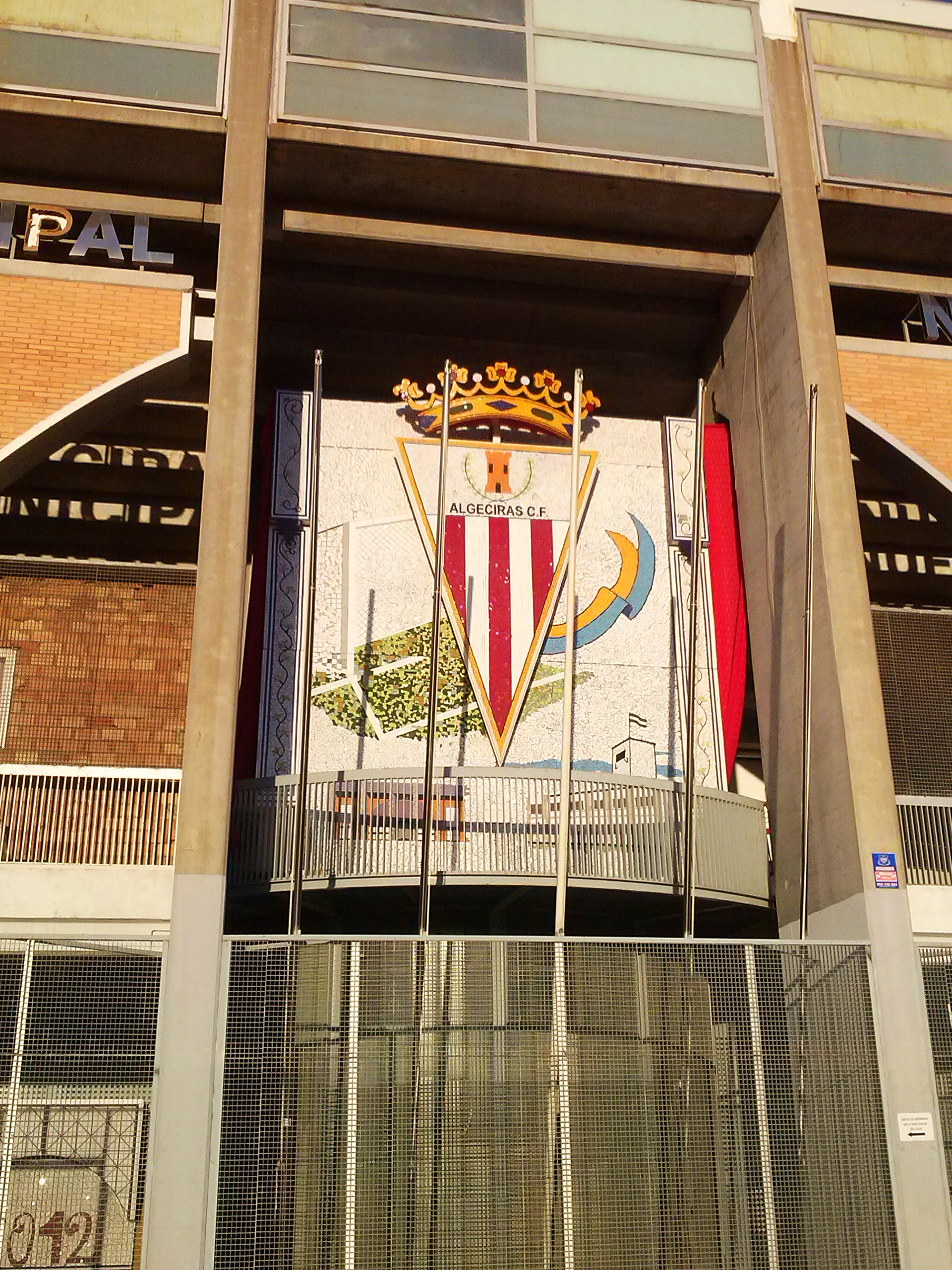 Detalle de la fachada del Estadio Municipal Nuevo Mirador de la localidad andaluza de Algeciras, España. Se observa el escudo del equipo local, el Algeciras C.F., sobre la puerta de acceso principal al recinto.